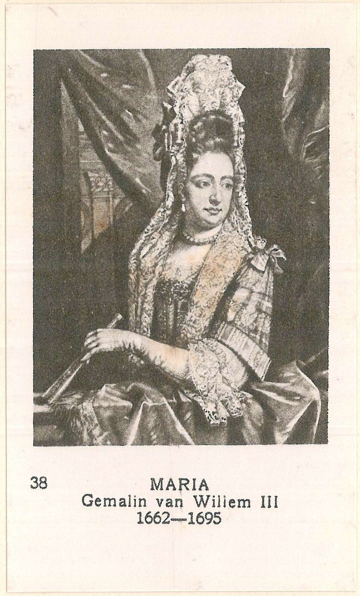 38 Maria, Gemahlin van Willem III, 1662-1695 Vaderlandse Historie 2 (1926)